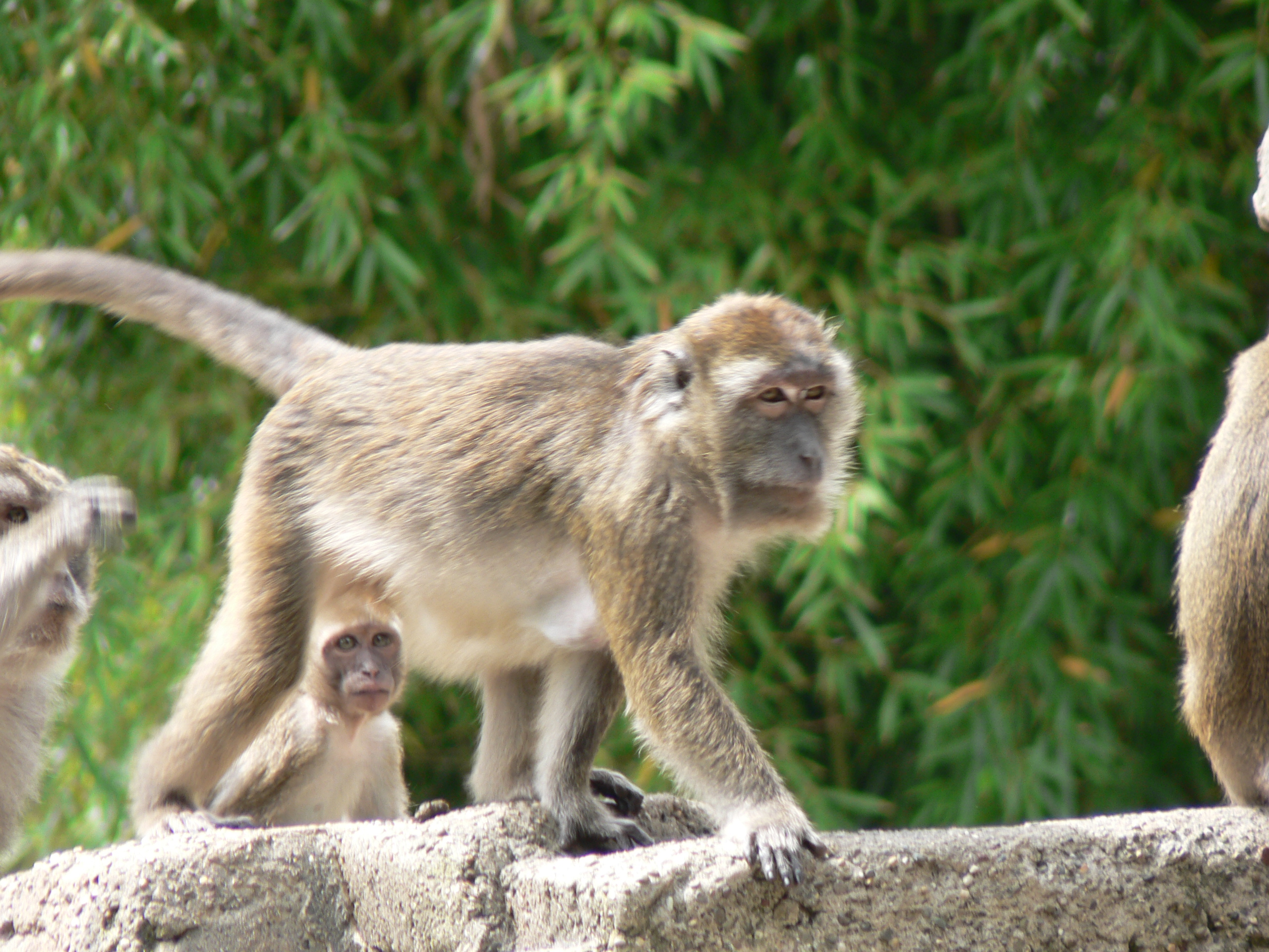 Javaneraffe im Zoo Basel